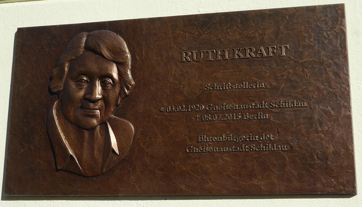 Erinnerungstafel für Ruth Kraft am Museum in Schildau